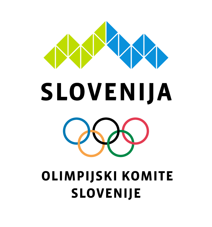 Znak Olimpijskega komiteja Slovenije